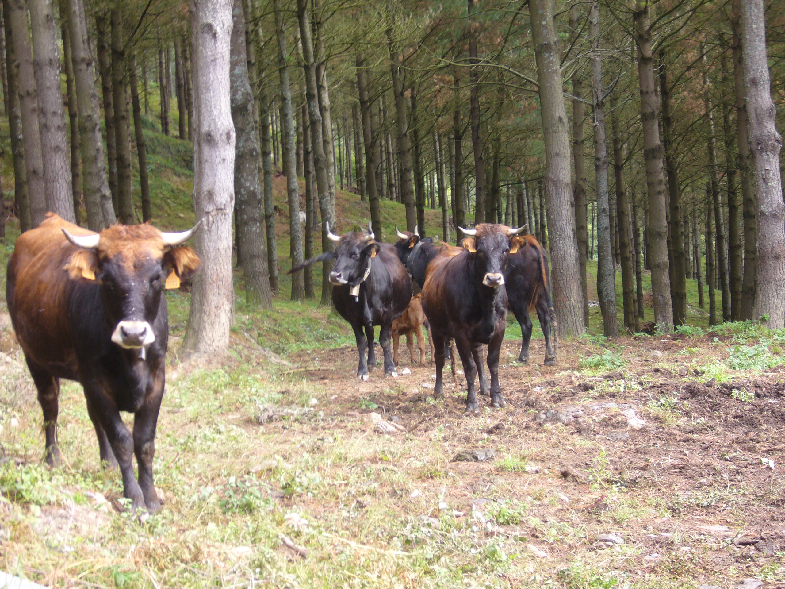 Behi terreña taldea Azkoitiko pinudi batean